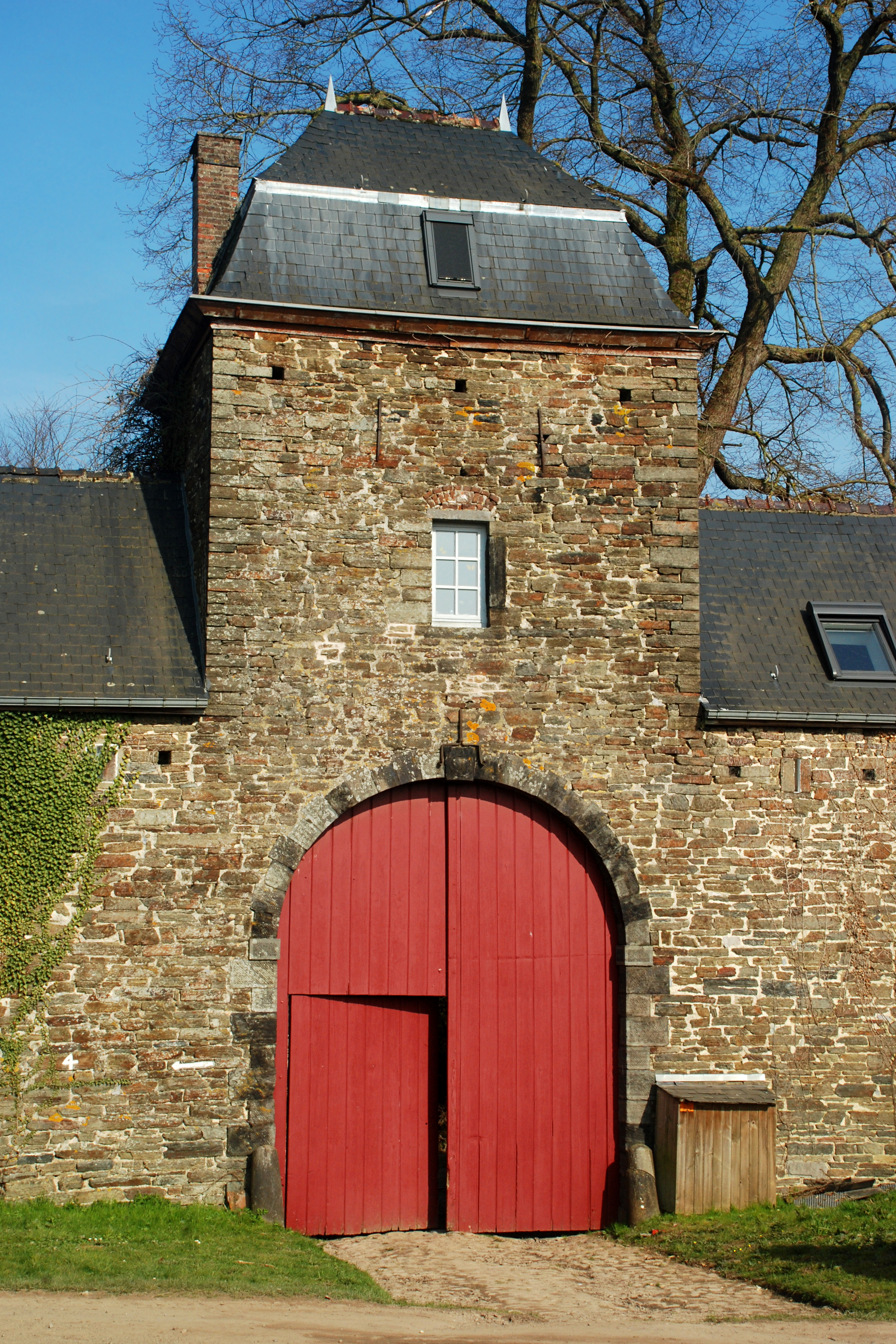 Belgique - Brabant wallon - Villers-la-Ville - Porte de Nivelles